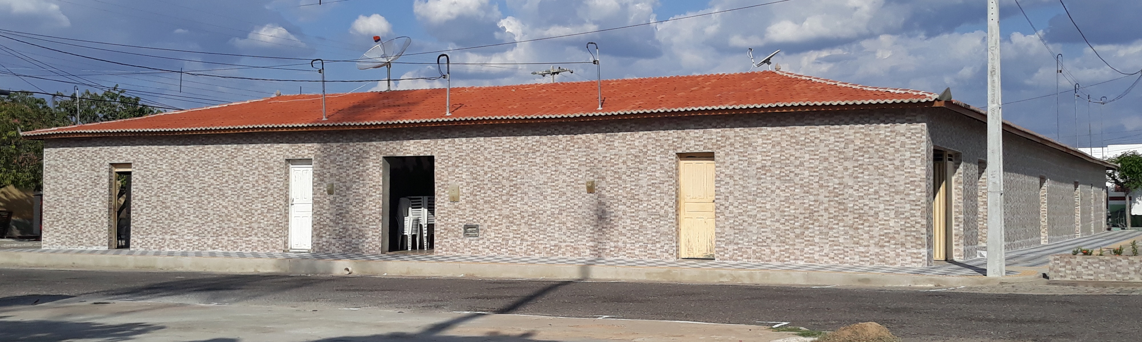 Mercado Público de Francisco Dantas, Rio Grande do Norte (Brasil).